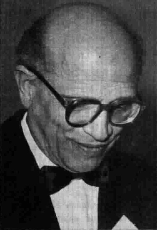 Guido Pannain, musicologo, storico della musica e compositore italiano.